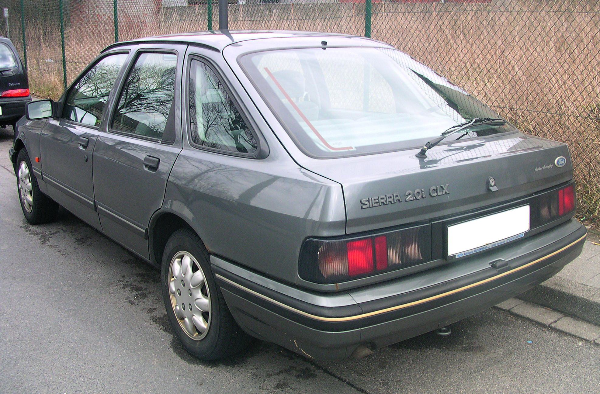 Ford Sierra CLX Viertürer, Baujahr 1990